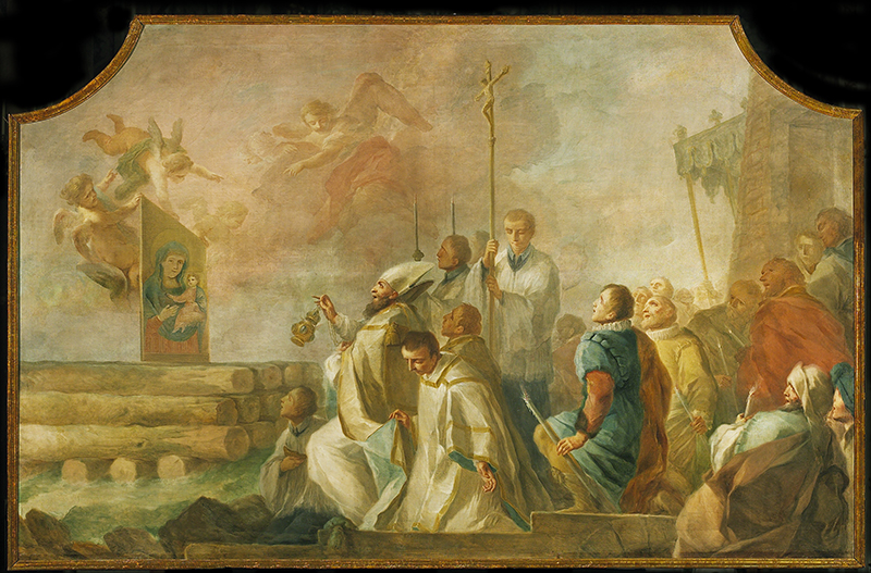 Bardellino ridimensionato